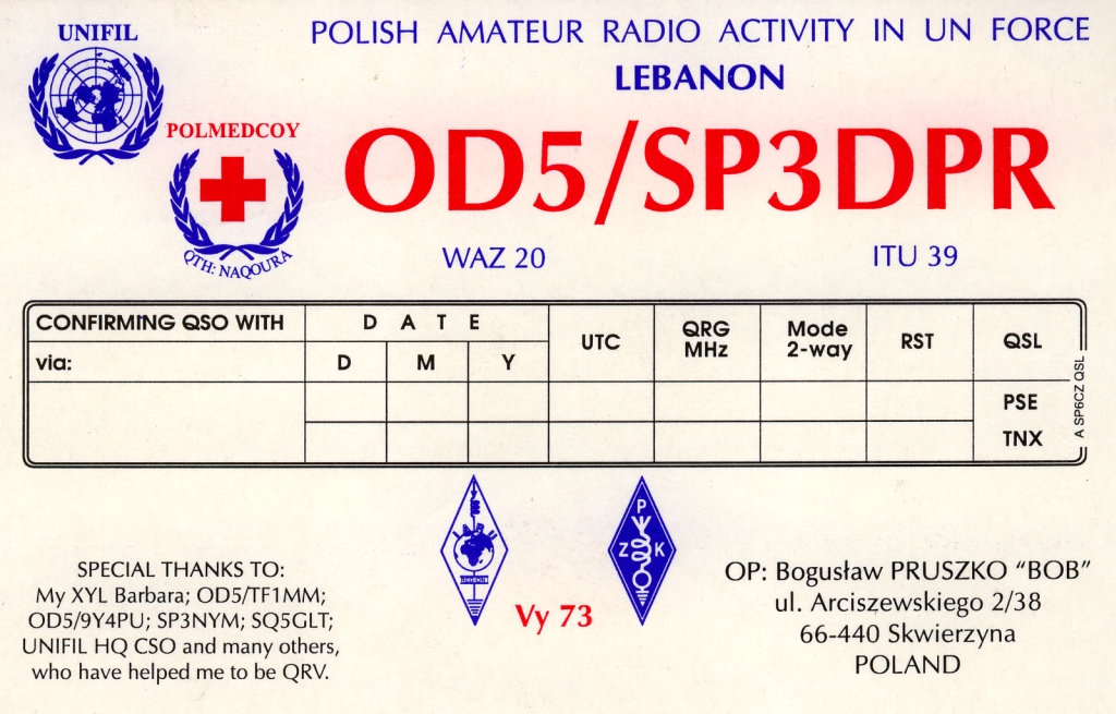 Karta QSL Bogusława SP3DPR podczas misji pokojowej ONZ w Libanie.